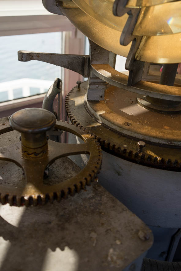 Engrenage de sortie de moteur pour entraîner le dispositif lenticulaire.